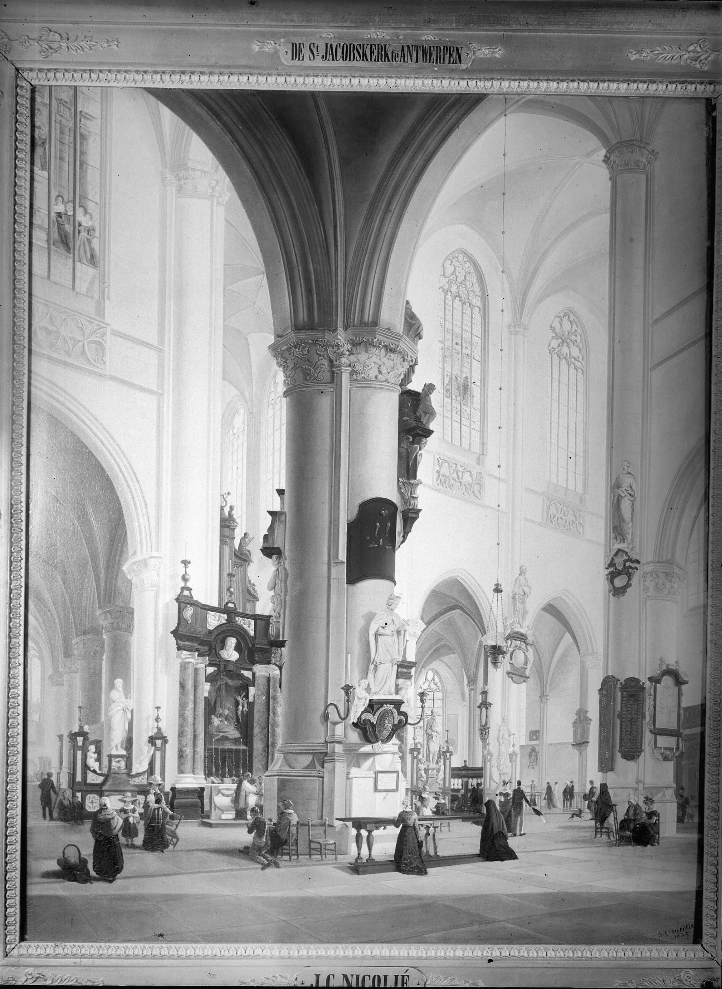 Saint Jaques: Schilderij met kerkinterieur (opmerking: Schilderij van Nicolie in het Rijksmuseum.) Address Antwerp Unknown Source/PhotographerRijksdienst voor het Cultureel Erfgoed Licensing[edit] This file was provided to Wikimedia Commons by the Rijksdienst voor het Cultureel Erfgoed as part of an image release. The Rijksdienst voor Cultureel Erfgoed, exclusively provides images that are either made by its own employees up to a 1200px size, or that are otherwise free of copyright. Attribution: Rijksdienst voor het Cultureel Erfgoed